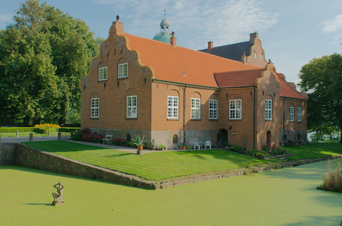 UlriksholmSlot 2012 (forside)